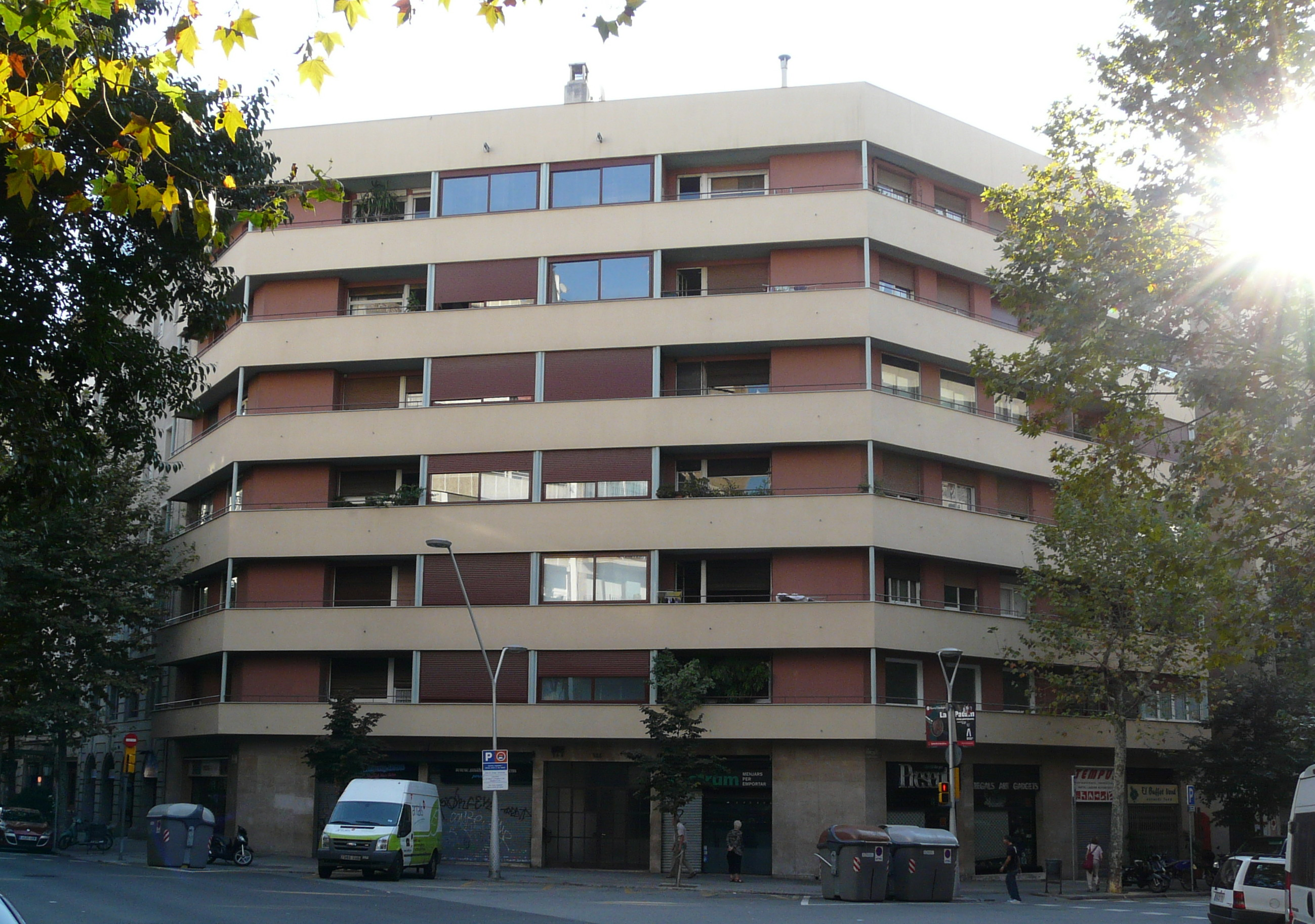 Casa Mercedes Ymbern de Cardenal (Barcelona)